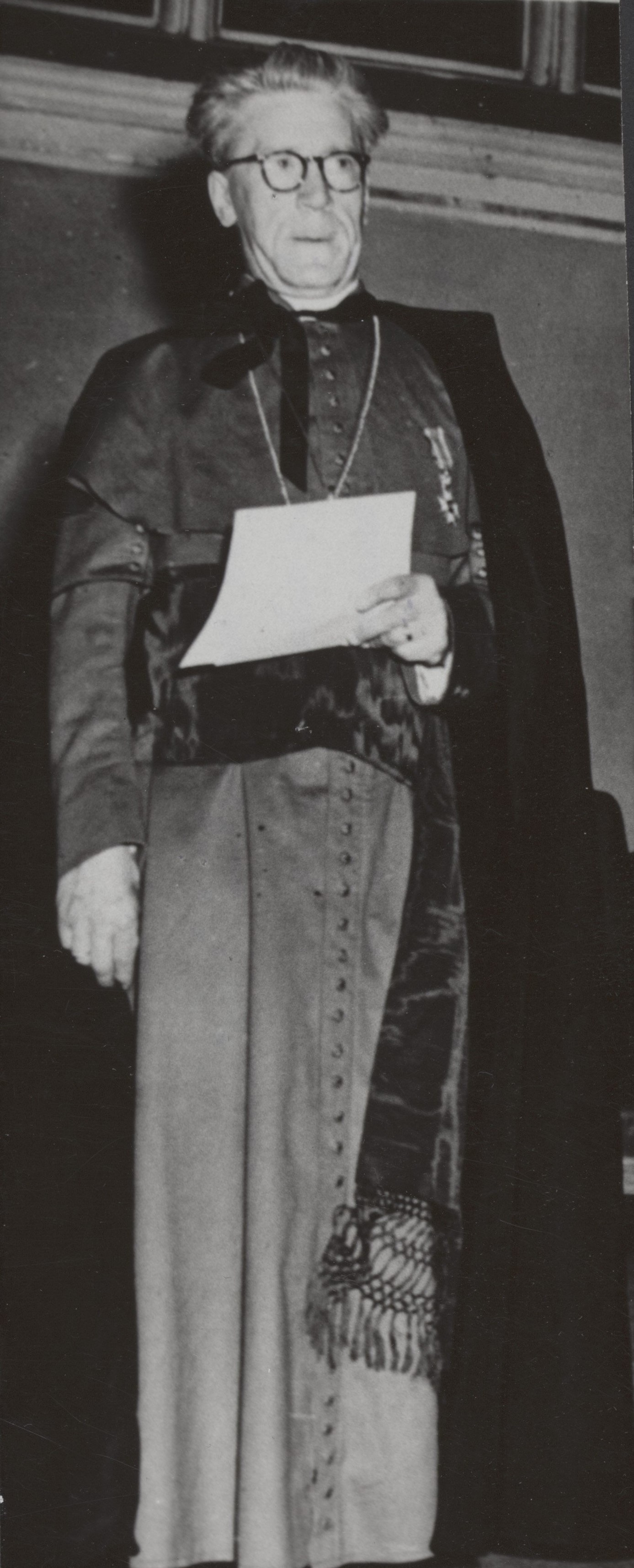 Collectie / Archief : Fotocollectie Elsevier Reportage / Serie : [ onbekend ] Beschrijving : De aartsbisschop van de oud-katholieke kerk dr. A. Rinkel Datum : 13 oktober 1966 Trefwoorden : geestelijken, portretten Persoonsnaam : Oud-Katholieke Kerk, Rinkel A. Fotograaf : Fotograaf Onbekend / Anefo Auteursrechthebbende : Nationaal Archief Materiaalsoort : Foto (zwart/wit) Nummer archiefinventaris : bekijk toegang 2.24.05.02 Bestanddeelnummer : 093-0011